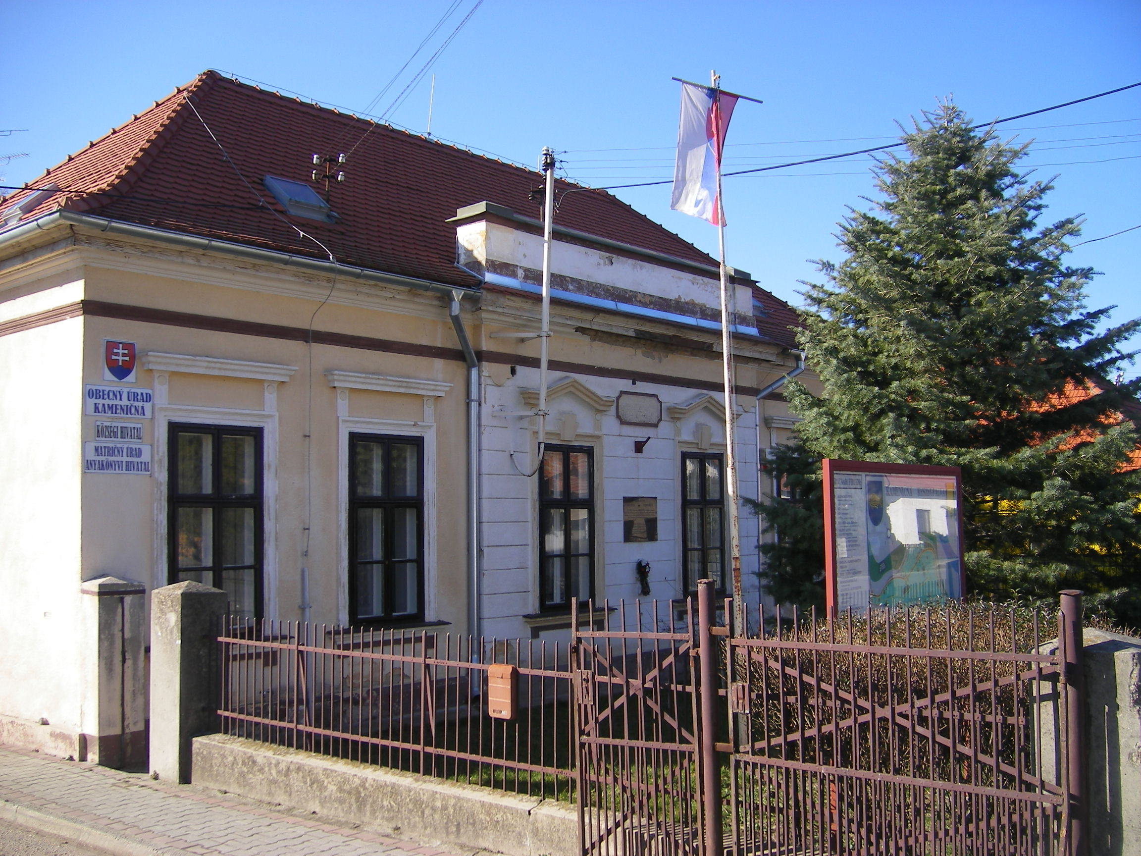 sk: Kameničná, obecný úrad hu: Keszegfalva, községi hivatal